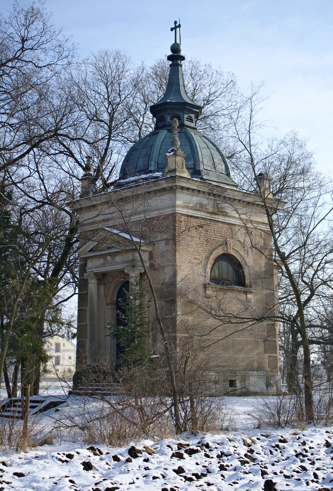 Batthyány-Geist-vadászkastély kápolnája (Kondoros, Geist-Csákó Kastélypark) This is a photo of a monument in Hungary. Identifier: 16255